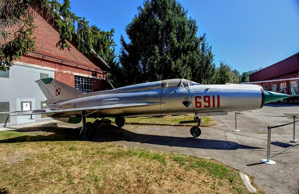 Mig 21 area esterna di Volandia